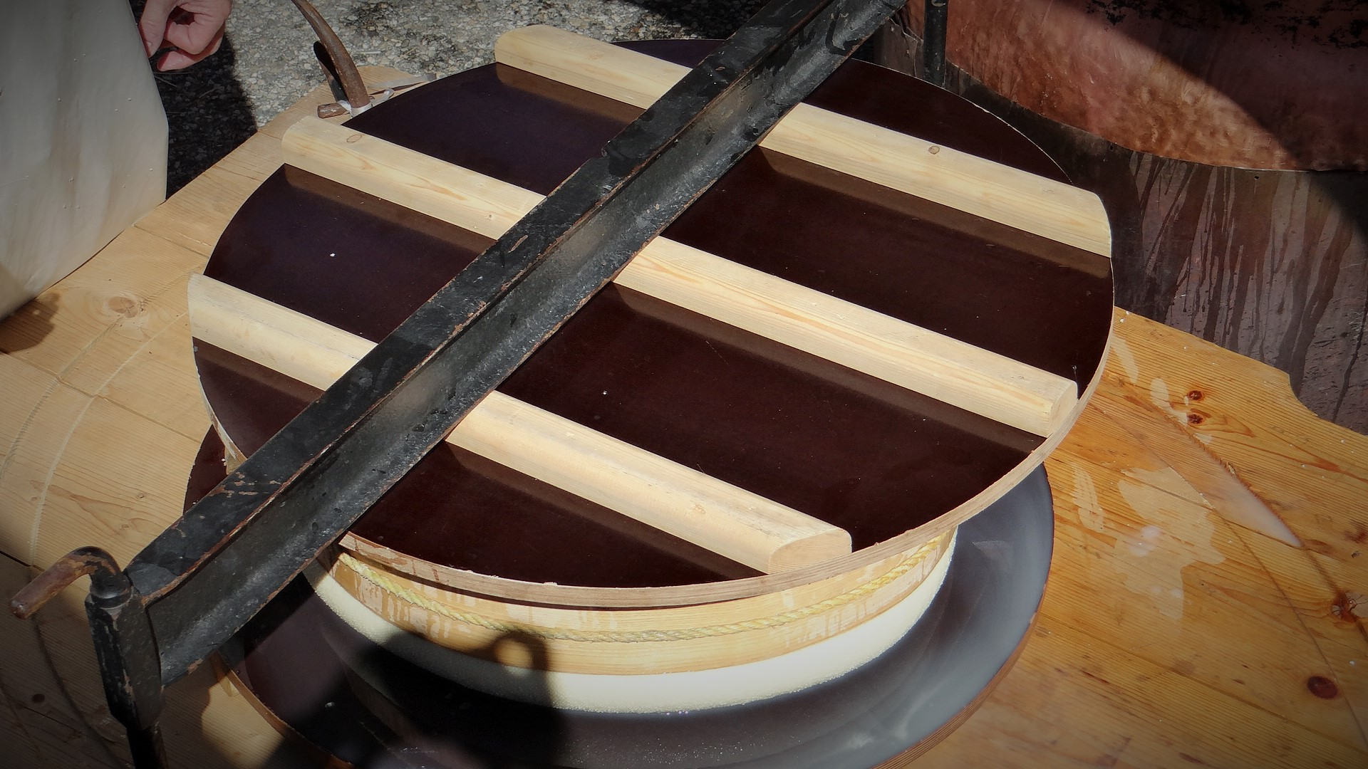 Fabrication traditionnelle du Beaufort par la Coopérative Laitière de Moutiers lors de la fête de l’Alpe et des Guides de Pralognan-la-Vanoise, 17 juillet 2016 ː le pressage